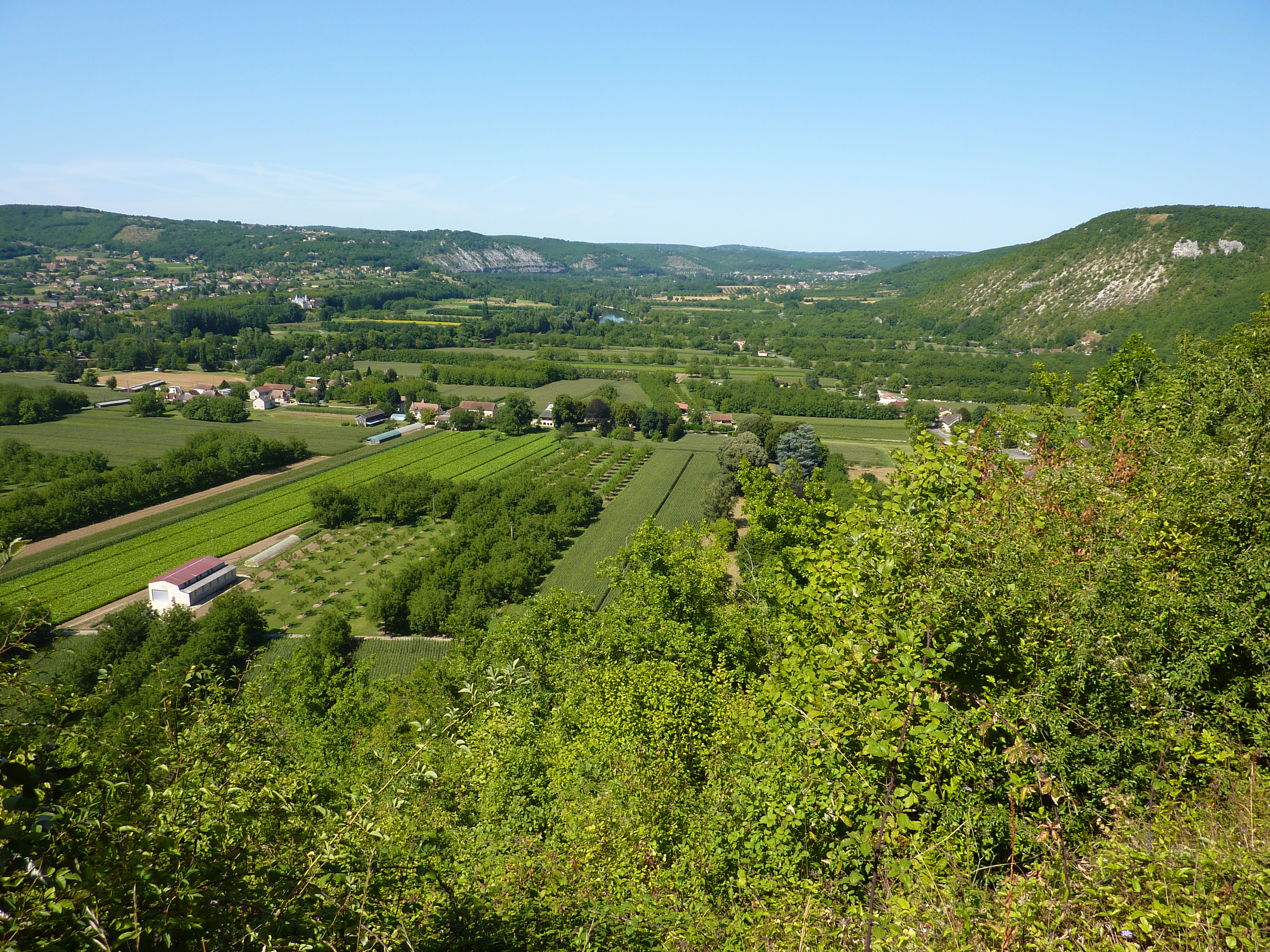 La vallée de la Dordogne dans la commune de Le Roc (Lot, Midi-Pyrénées, France). Polyculture. Dans le fond la ville de Souillac.